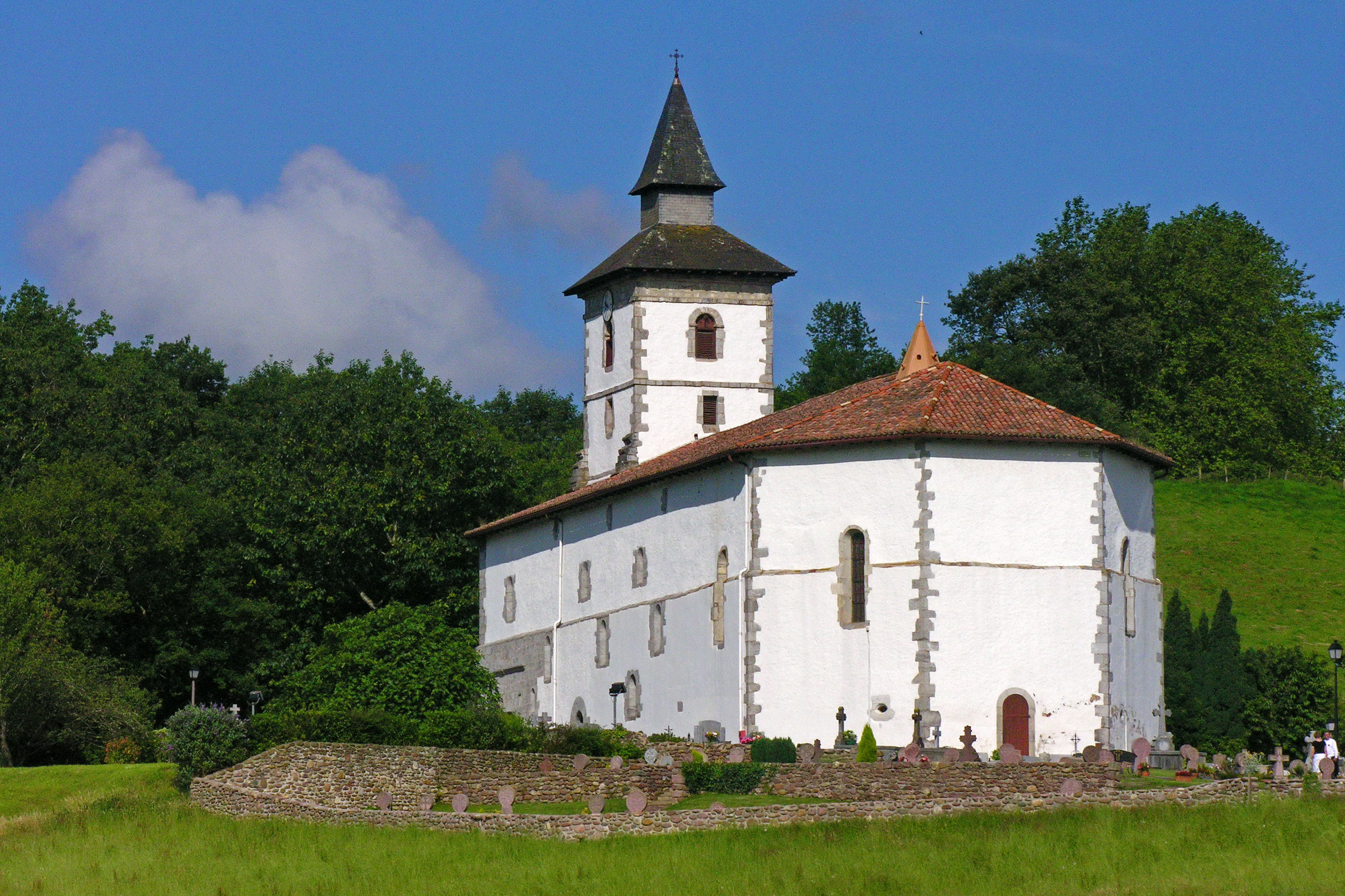 Eglise Saint-Fructueux .